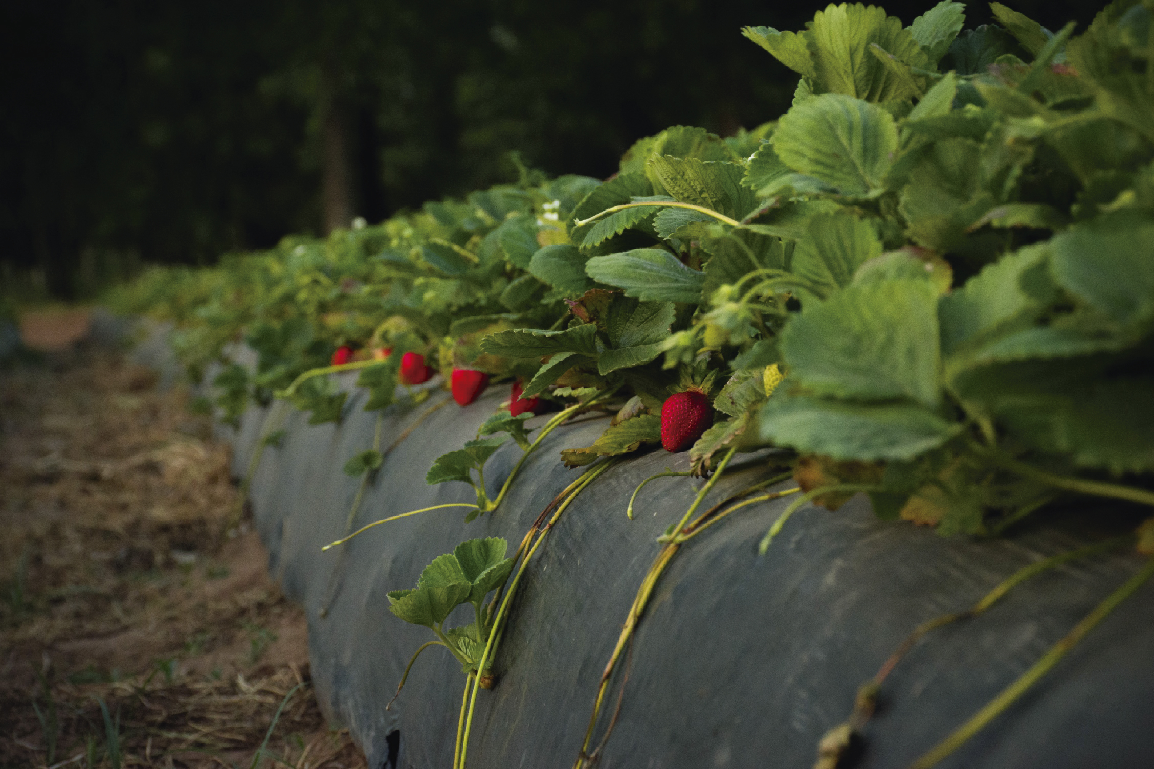 Producción de Frutas Finas en la ciudad de Plottier. Fotografo: Juan Vittanueva